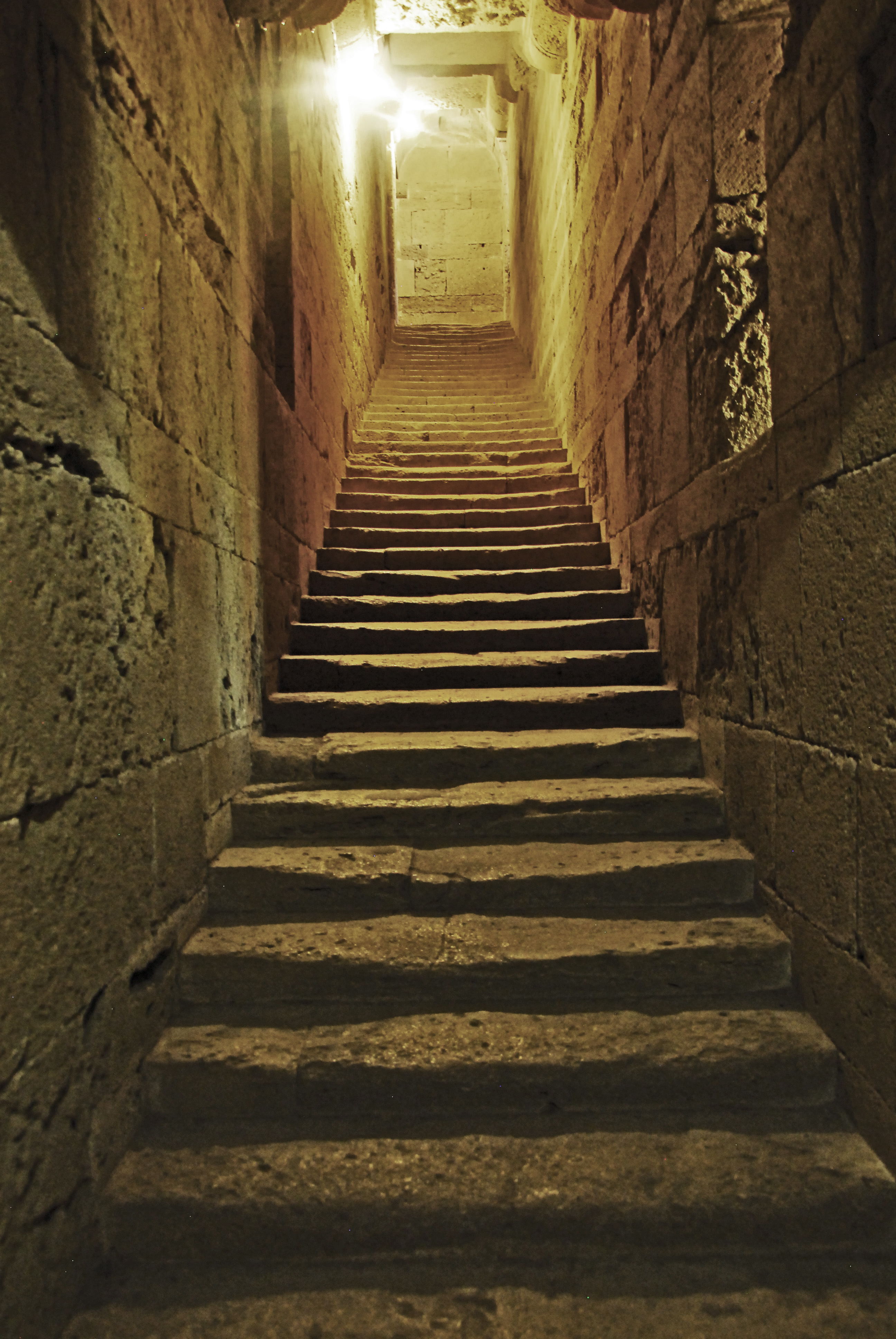 St-Pierre-et-St-Paul de Maguelone, Geschosstrepper aufwärts